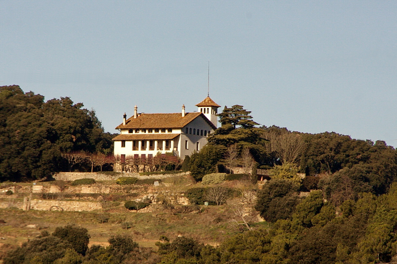 Casa Fargas, obra de 1919 de Josep Puig i Cadafalch a Sant Quirze Safaja (Moianès, Catalunya).